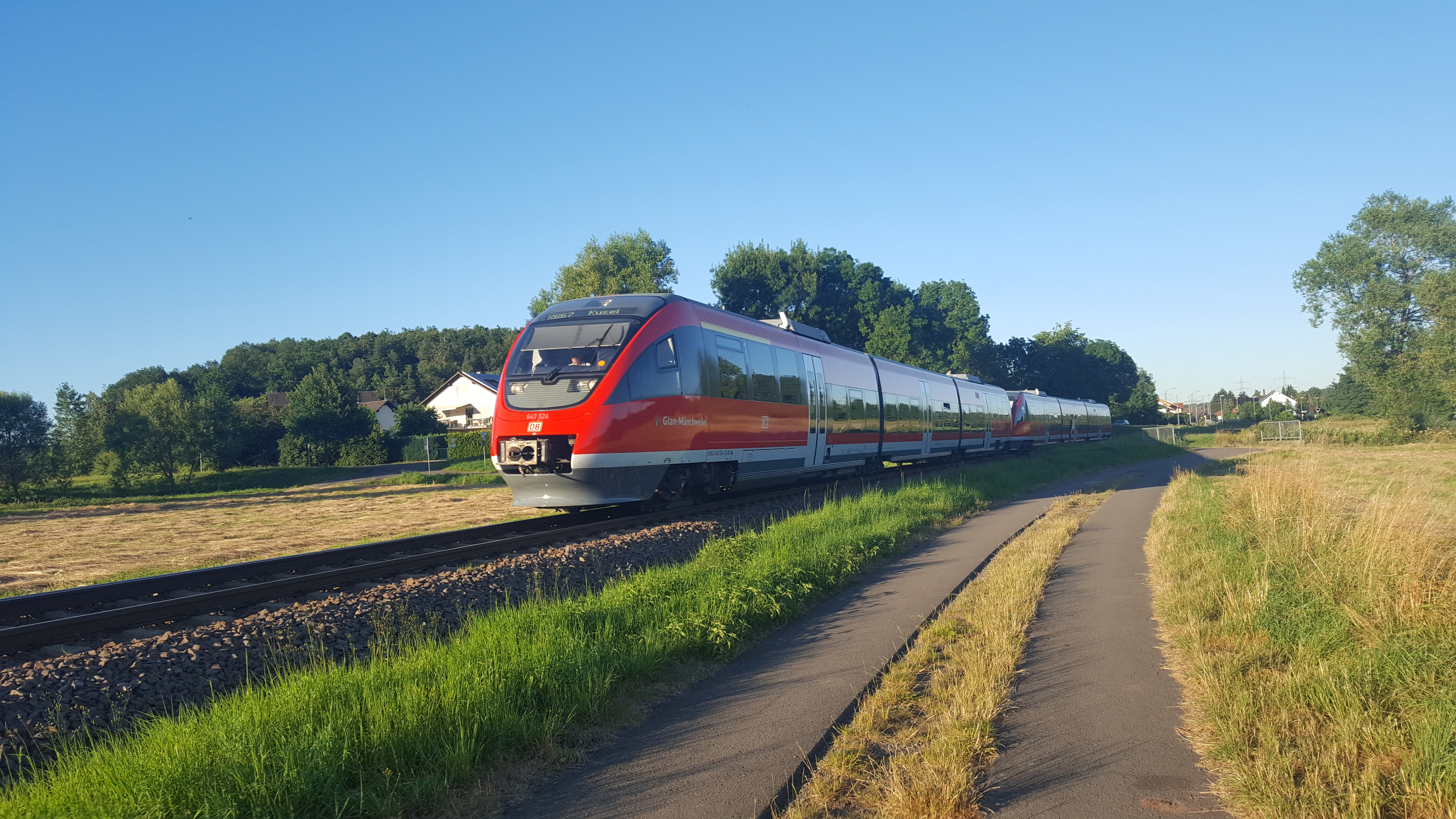 RB12890 nach Kusel bei Miesenbach